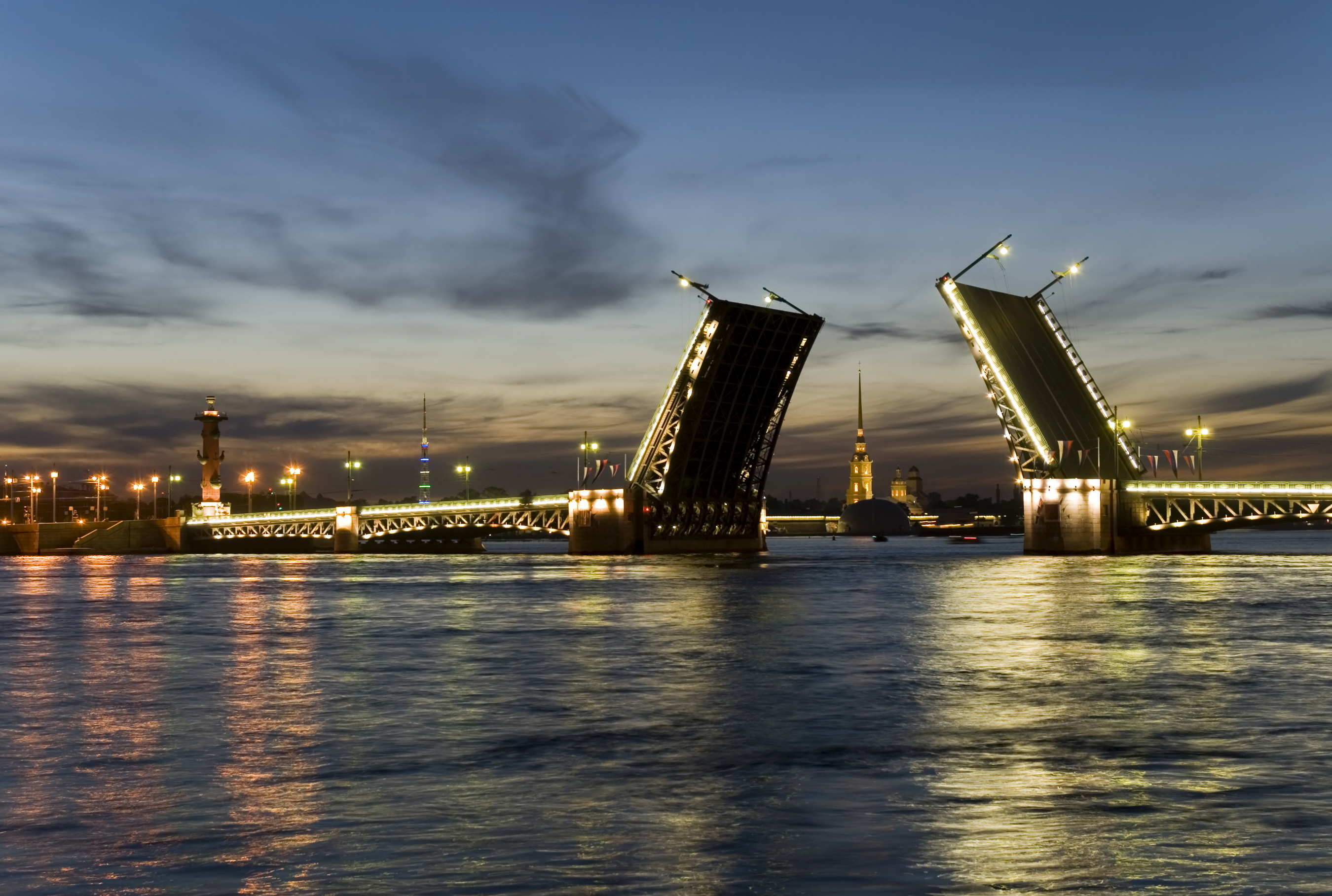 Санкт-Петебург